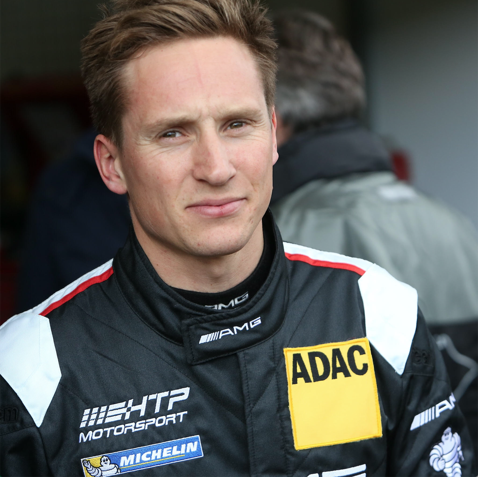 Profielfoto Renger van der Zande 2016